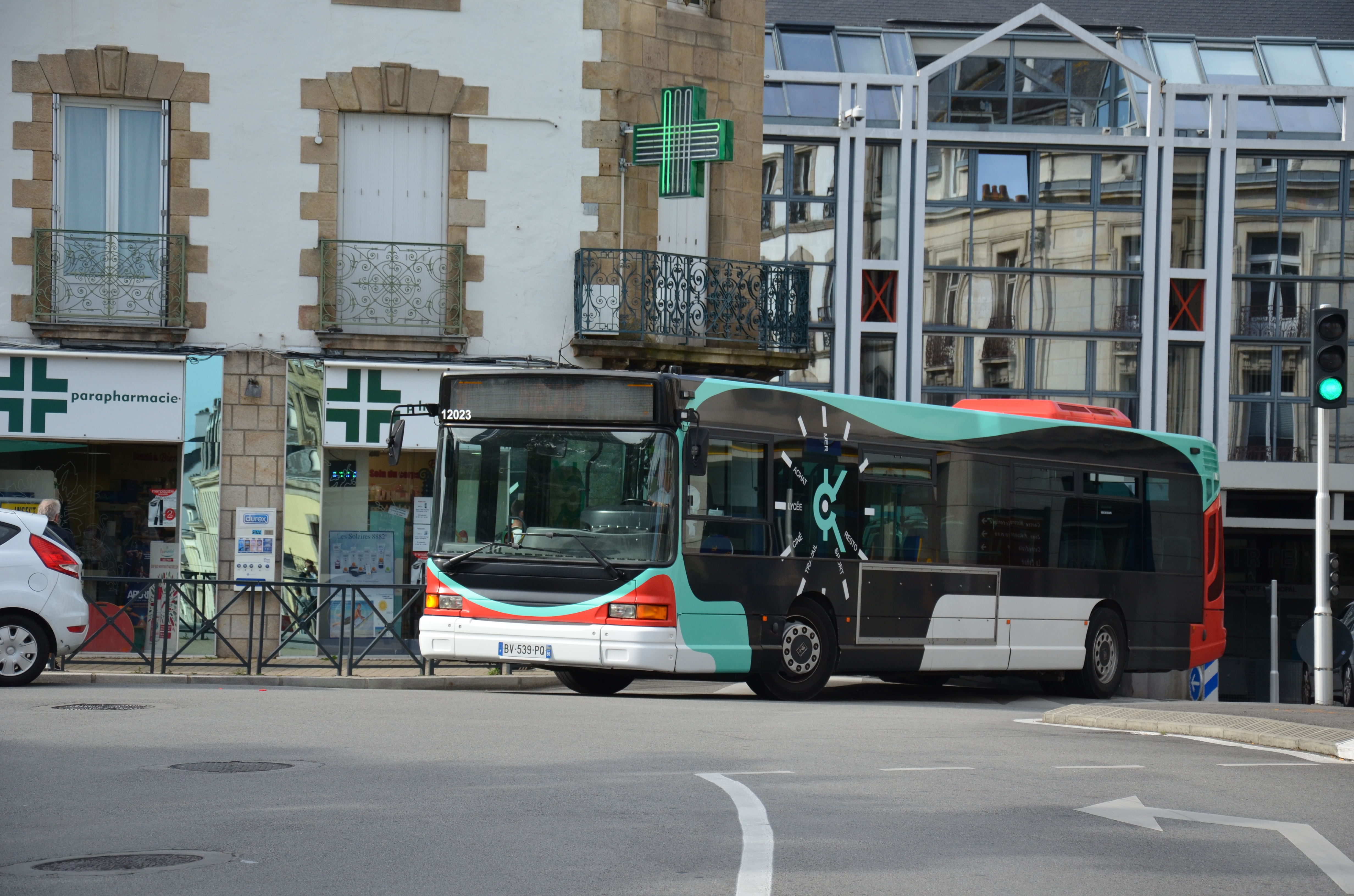 Heuliez GX 317 n°12023 près de l'arrêt Hôtel de Ville, sur le réseau Kicéo de Vannes.